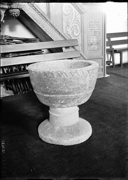 Dopfunt, snabbinv. Kategori: (04) DopfuntarDopfunt, snabbinv.